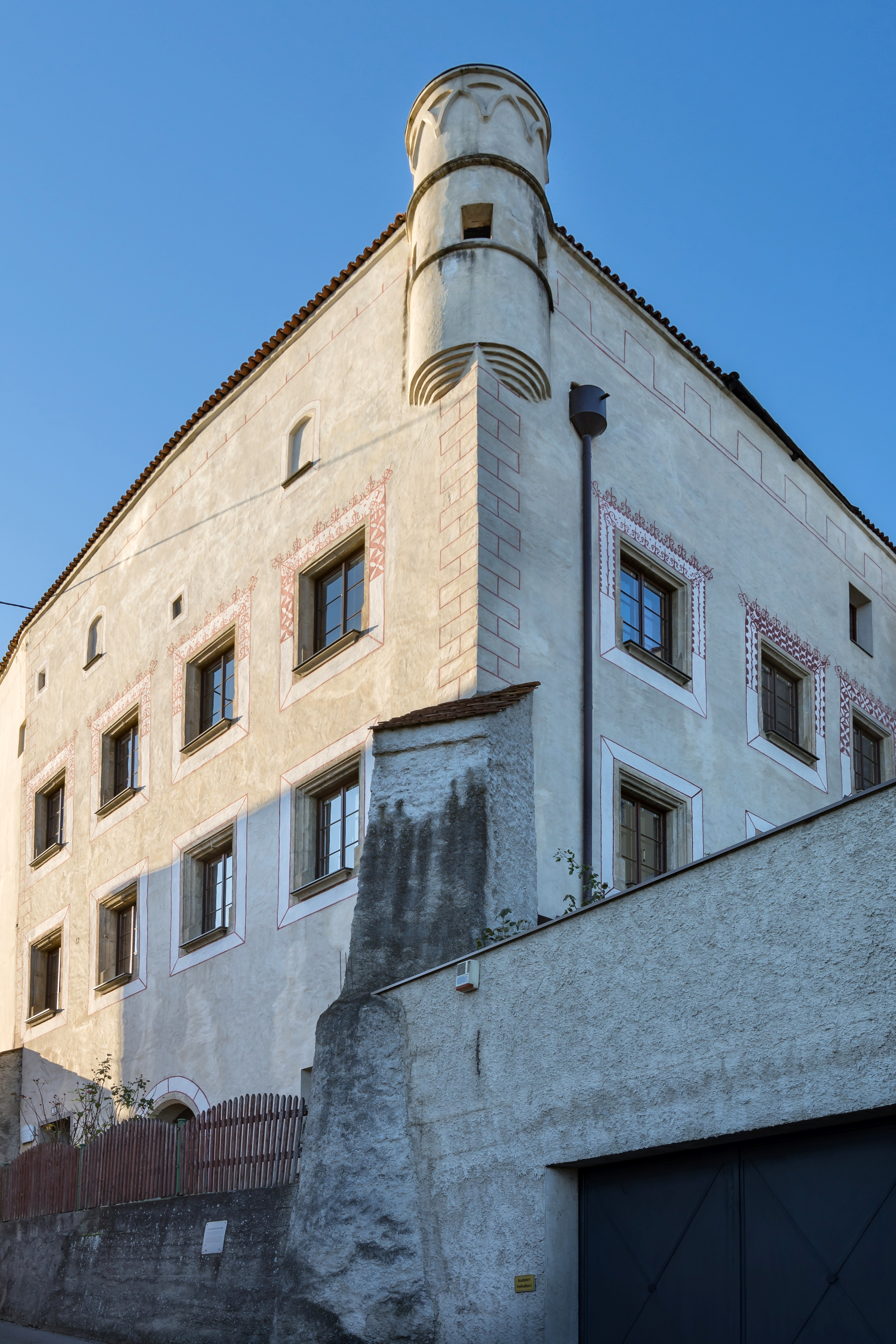 Das Wohnhaus Ennsberg 1 ist ein Teil der ehem. landesfürstlichen Burg.